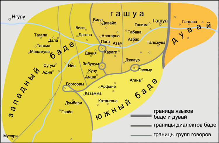 Ареалы языков дувай и баде с диалектами (Нигерия). Источники: Schuh, Russell G. Using dialect geography to determine prehistory: A chadic case study // Spracheund Geschichte in Afrika. — 1981. — P. 210; Lewis, M. Paul, Gary F. Simons, Charles D. Fennig: Nigeria, Map 4. Ethnologue: Languages of the World (19th Edition). Dallas: SIL International (2016).